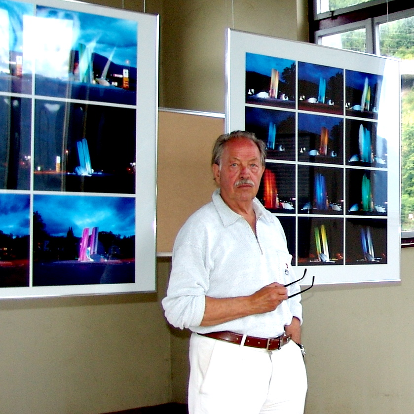 Portraitfoto Edgar Knoop, vor selbsterstellten fotos (Lichtreflexionsstelen 2008, Seeboden)